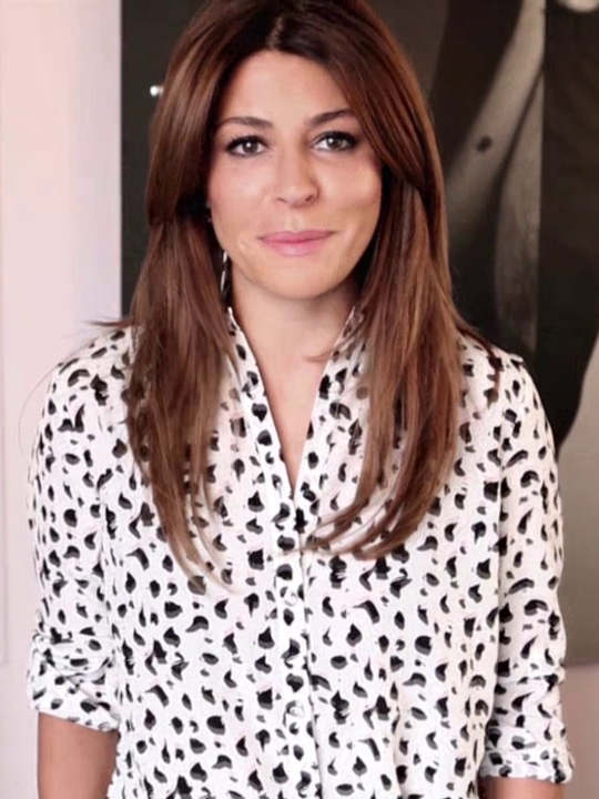 Screenshot uit 29 Seconds with Olcay: Papillon Pants.